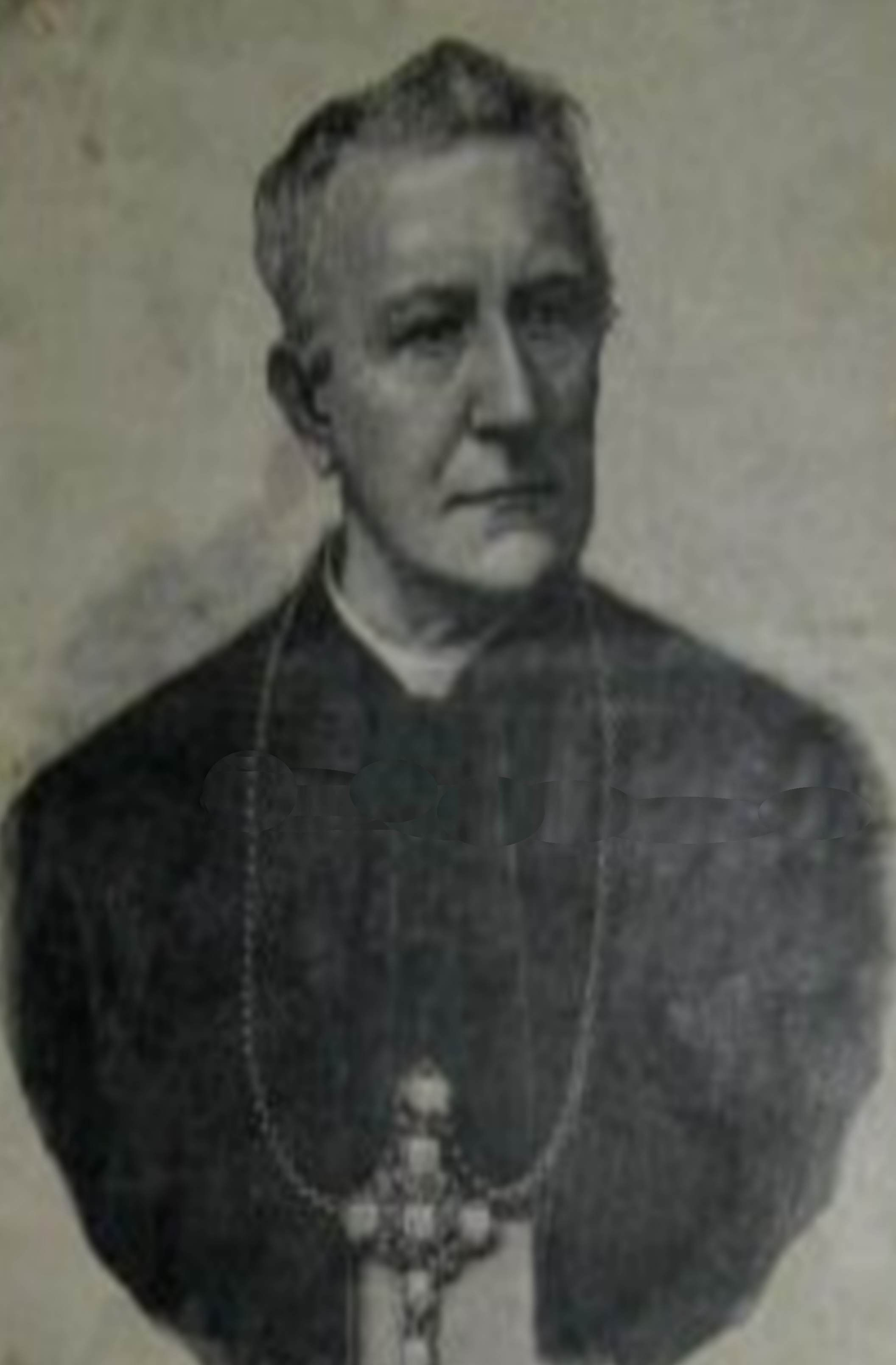 Georg Ignaz Komp (1828-1898) Bishof von Fulda 1894-1898